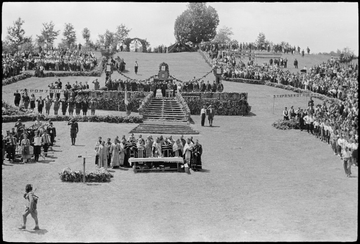 Други равногорски корпус прославља војничку славу Видовдан, 28. јуна 1944. године, у селу Лазац, на планини Јелици.